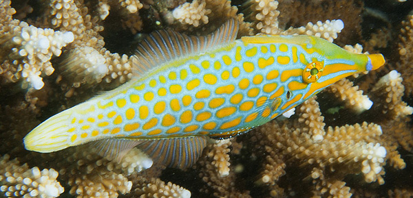 Un poisson-lime à taches oranges (Oxymonacanthus longirostris) à la Réunion.